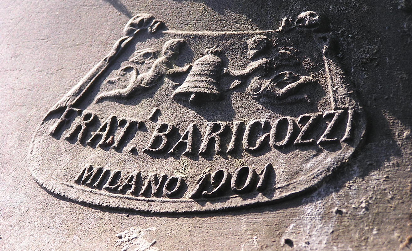 Il Marchio della fonderia Barigozzi sulla quarta campana di Cornaredo (MI)